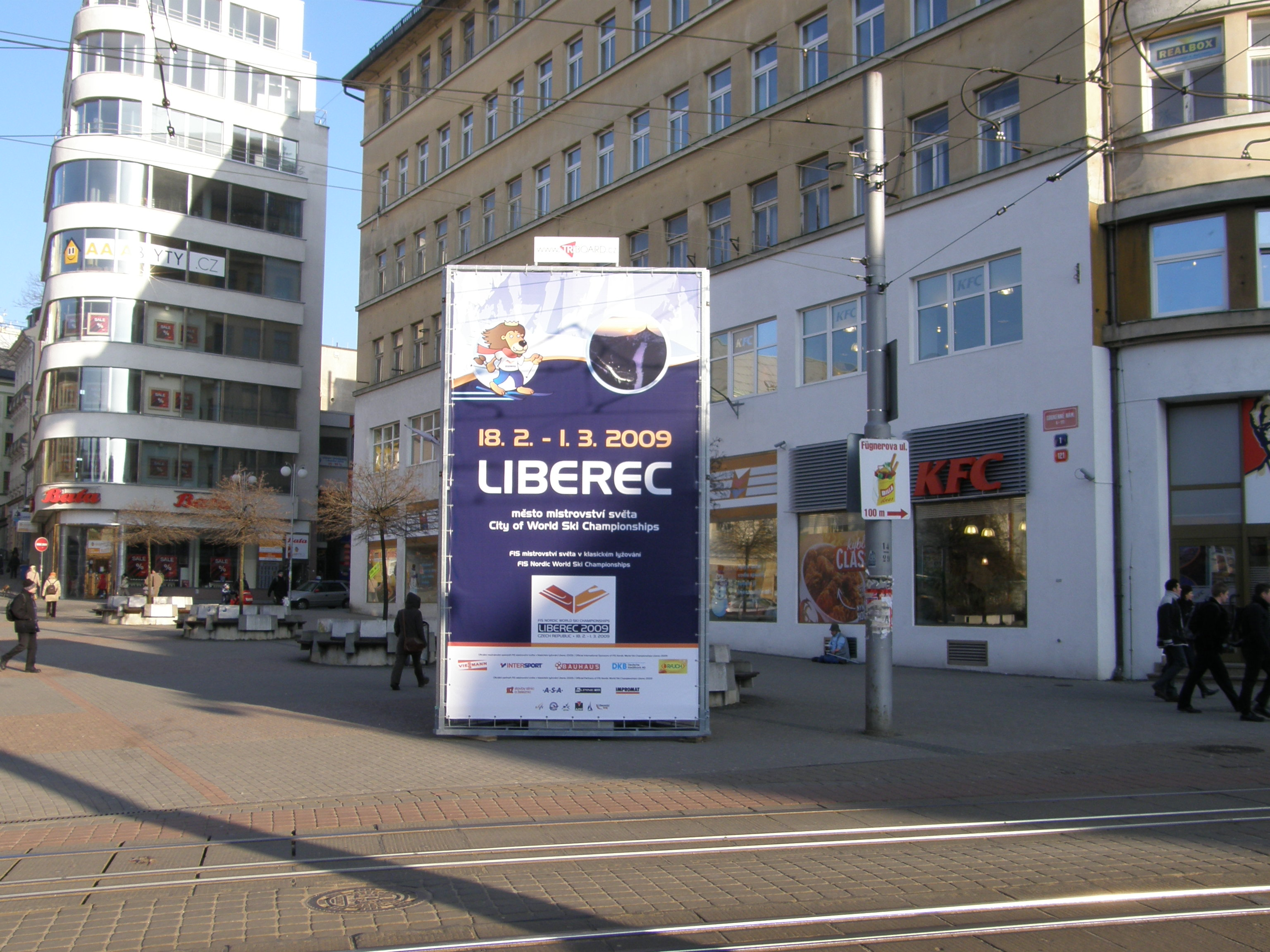 Liberec - plakat o mistrzostwach świata w narciarstwie klasycznym